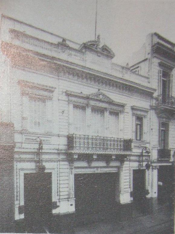 Antiguo edificio del diario "La Nación" en la calle San Martín 350, construido entre 1884 y 1895, con diseño del ingeniero Emilio Mitre. Fue demolido en 1992 para la construcción de la torre San Martín 344.